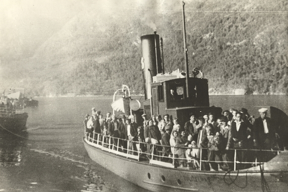 D/S "Sulitjelma V" som trafikkerte strekningen fra Finneid til Sjønstå. Bak dampskippet sees en slepebåt for kis. 1945 - 1956 NM.F.008507-00001